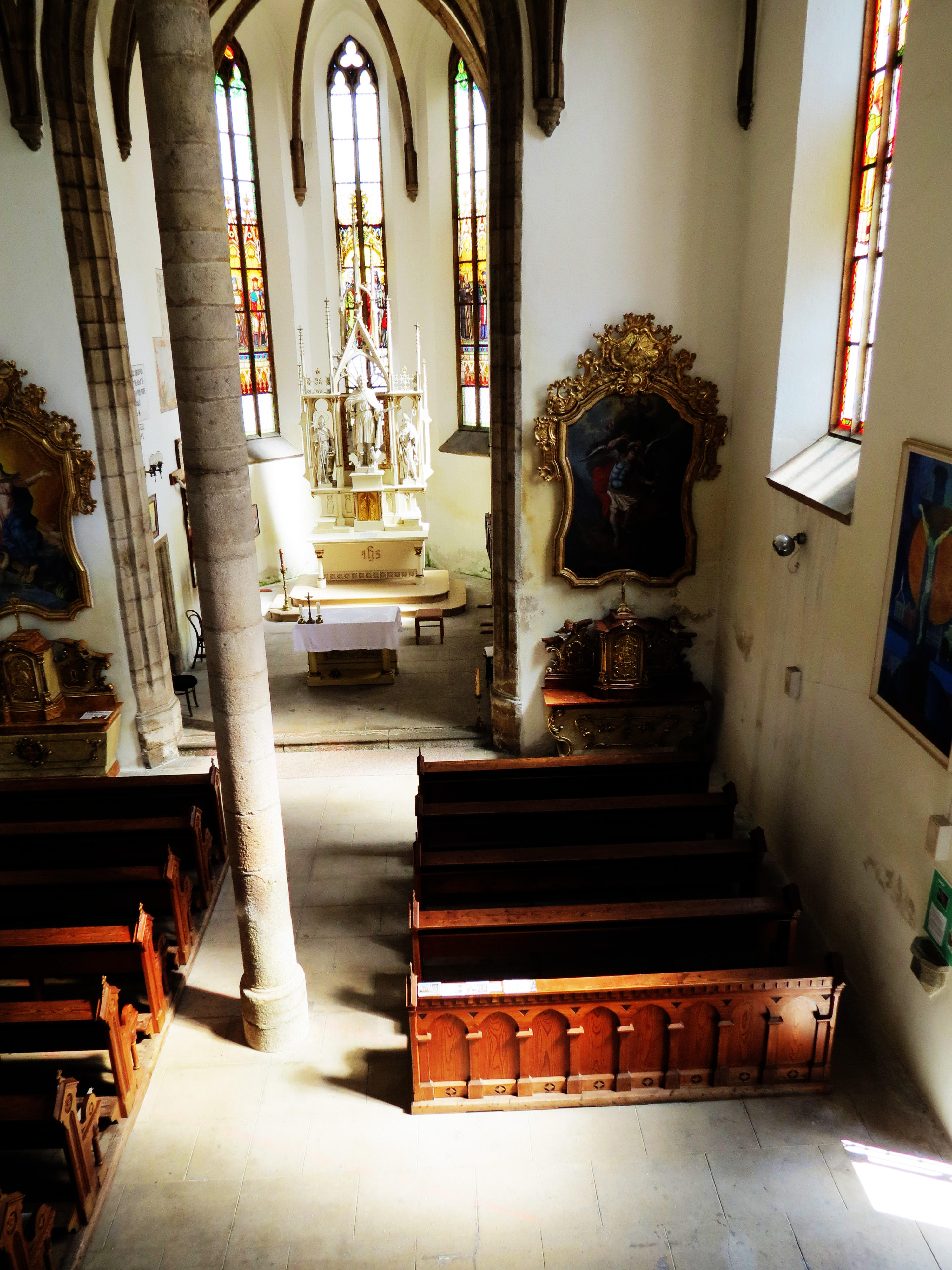 Interiér, pohled z kúru